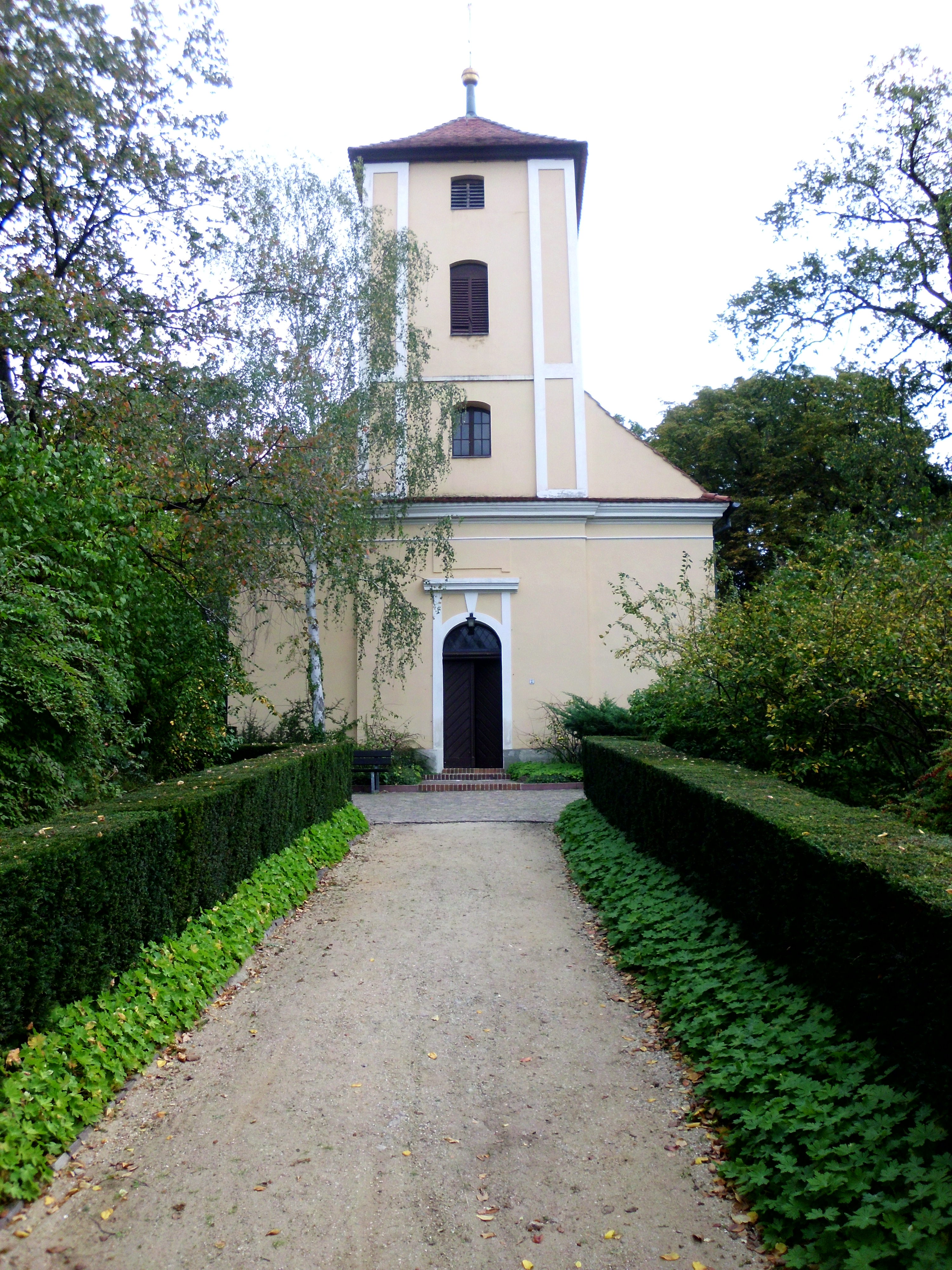 Kirche in Alt Töplitz (OT von Werder (Havel))